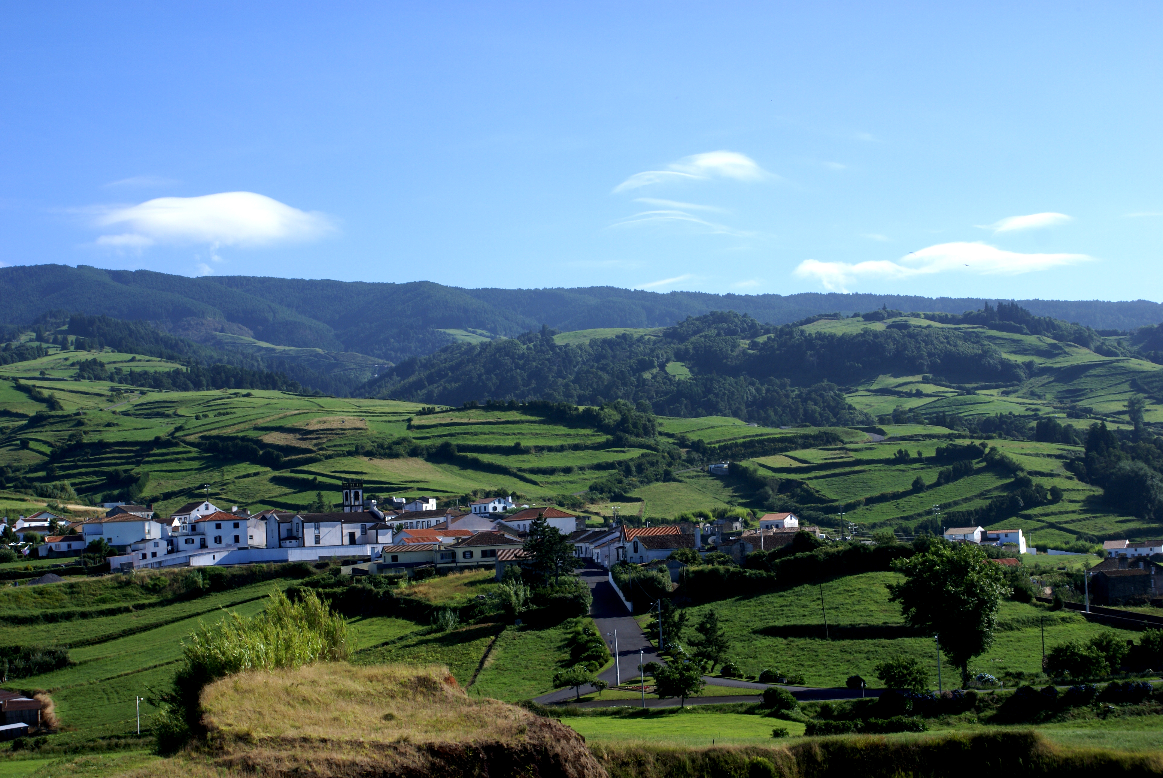 Vista de Santana, Nordeste, ilha de São Miguel, Açores